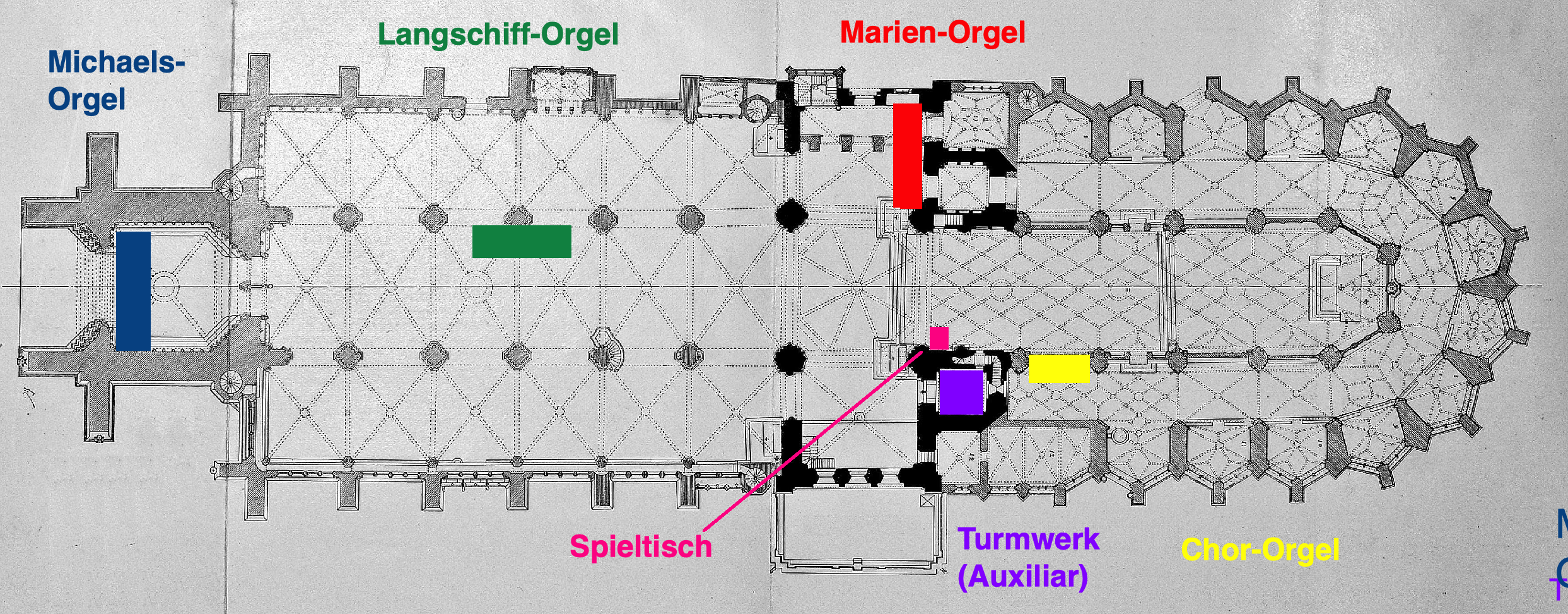 Positionierung der Orgeln im Münster